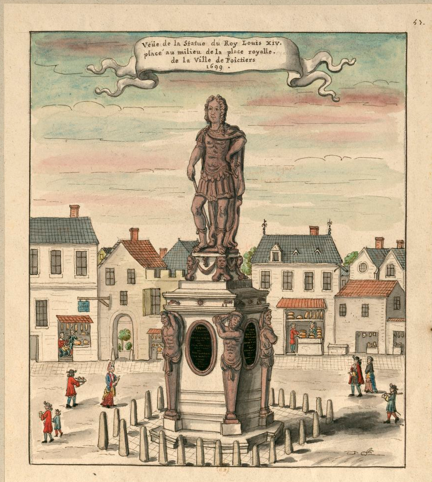 Vue de la statue du Roi Louis XIV placée au milieu de la place royale de la ville de Poitiers